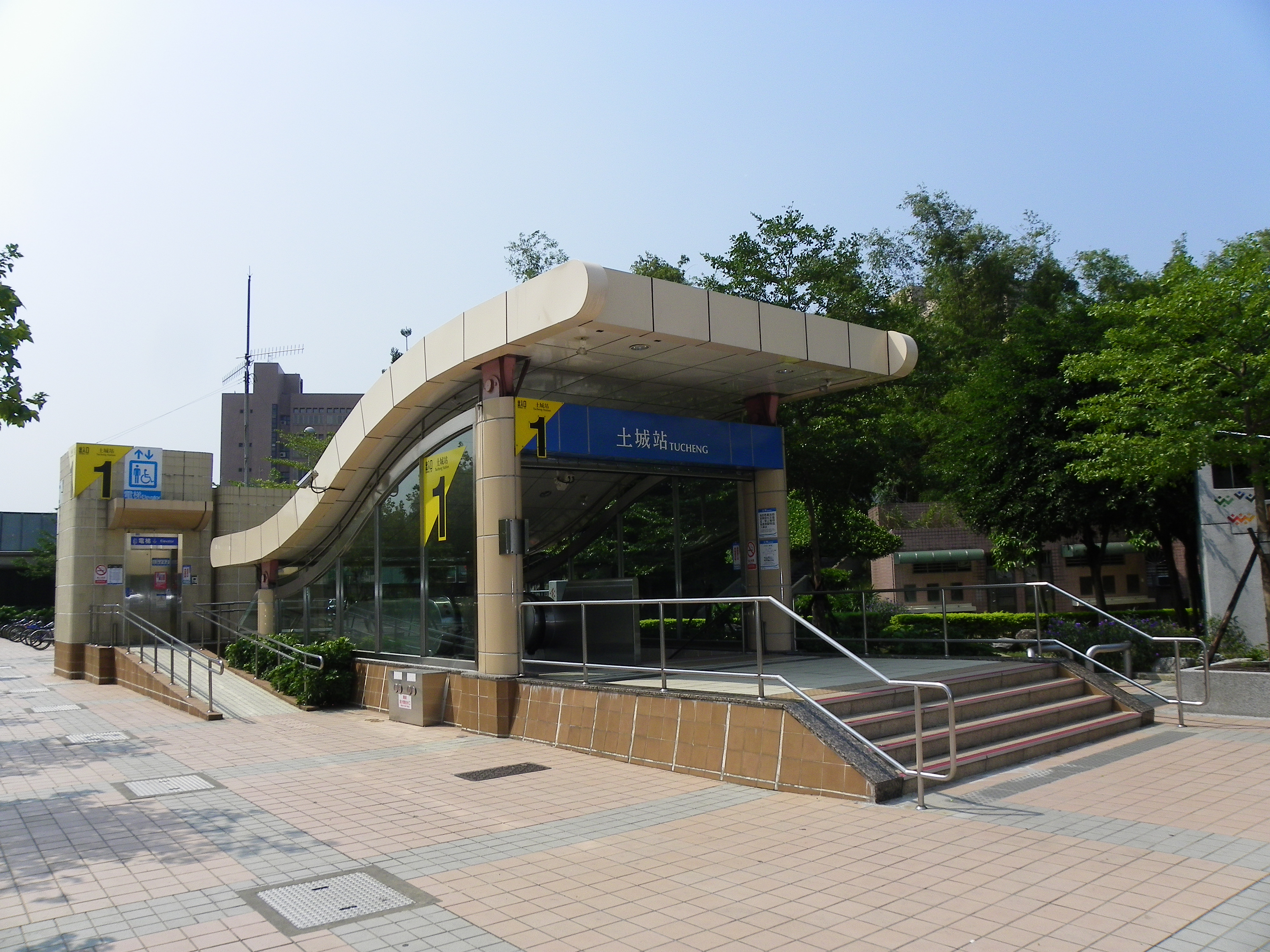 台北捷運土城線土城駅1号出口。